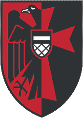 Wappen der Sudetendeutschen Landsmannschaft